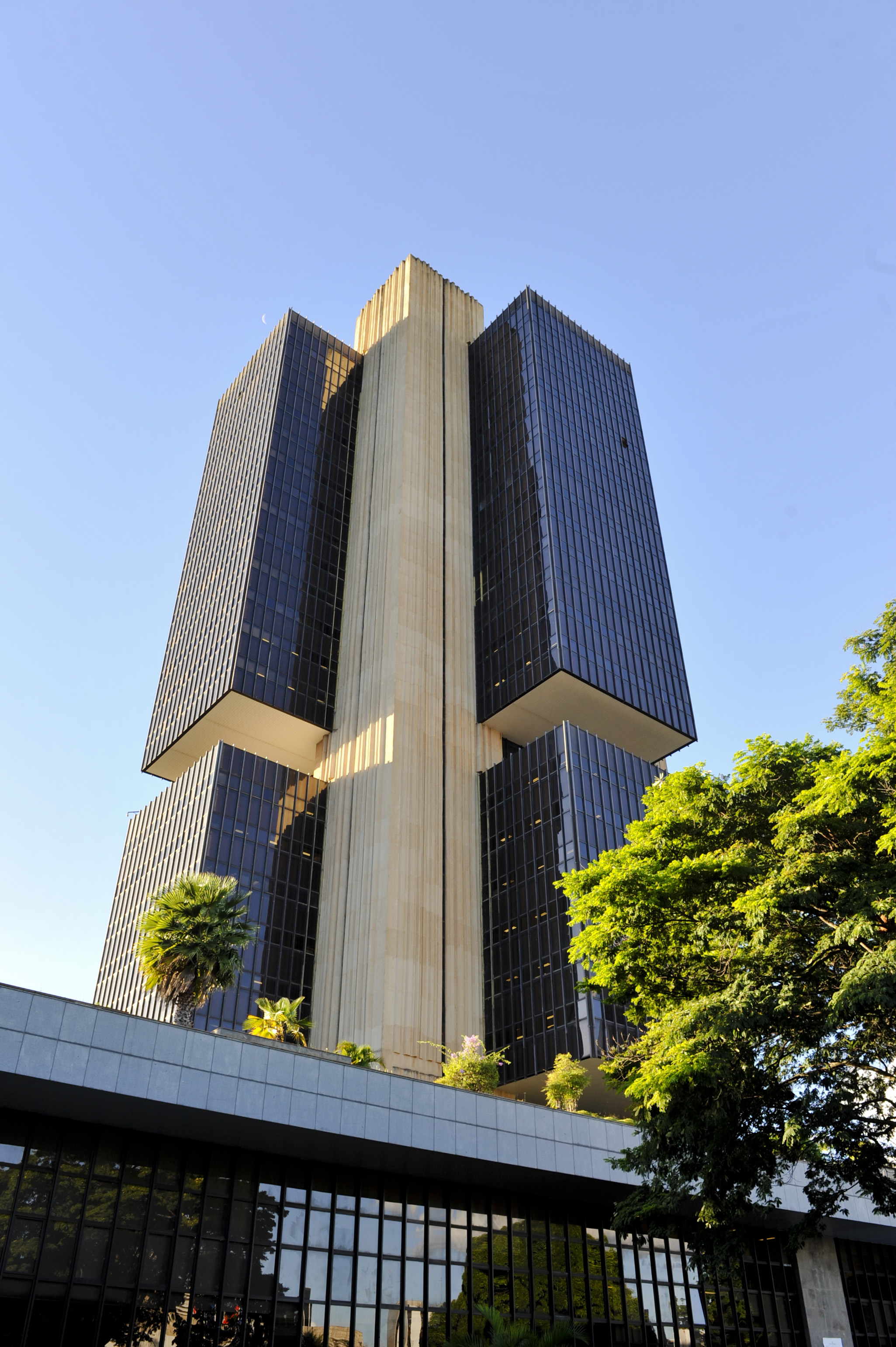 Edifício sede do Banco Central do Brasil. Foto: Jonas Pereira/Agência Senado